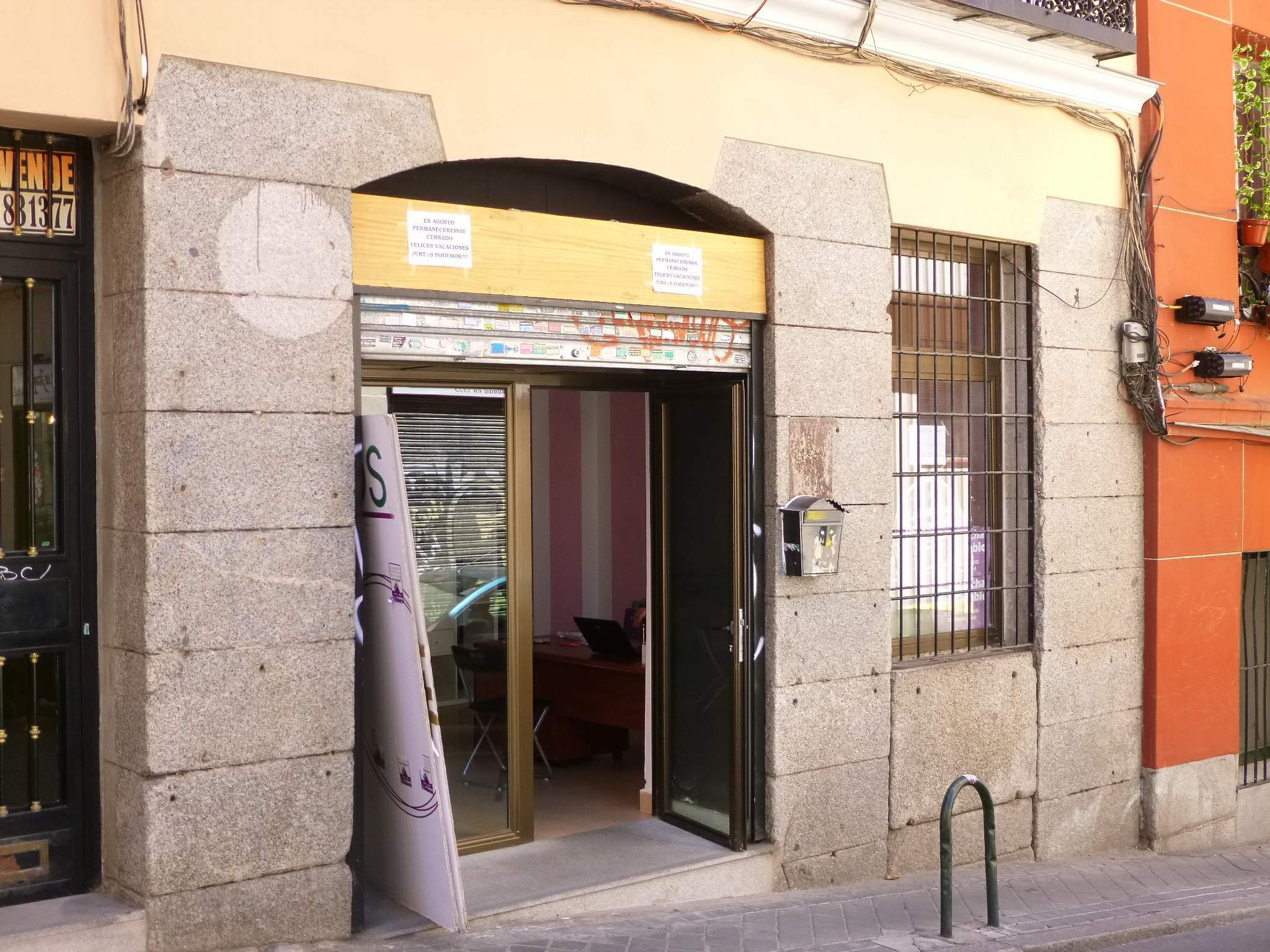 Círculo de Podemos en Madrid (Calle Zurita, 21). Imagen tomada el 27 de julio de 2015.